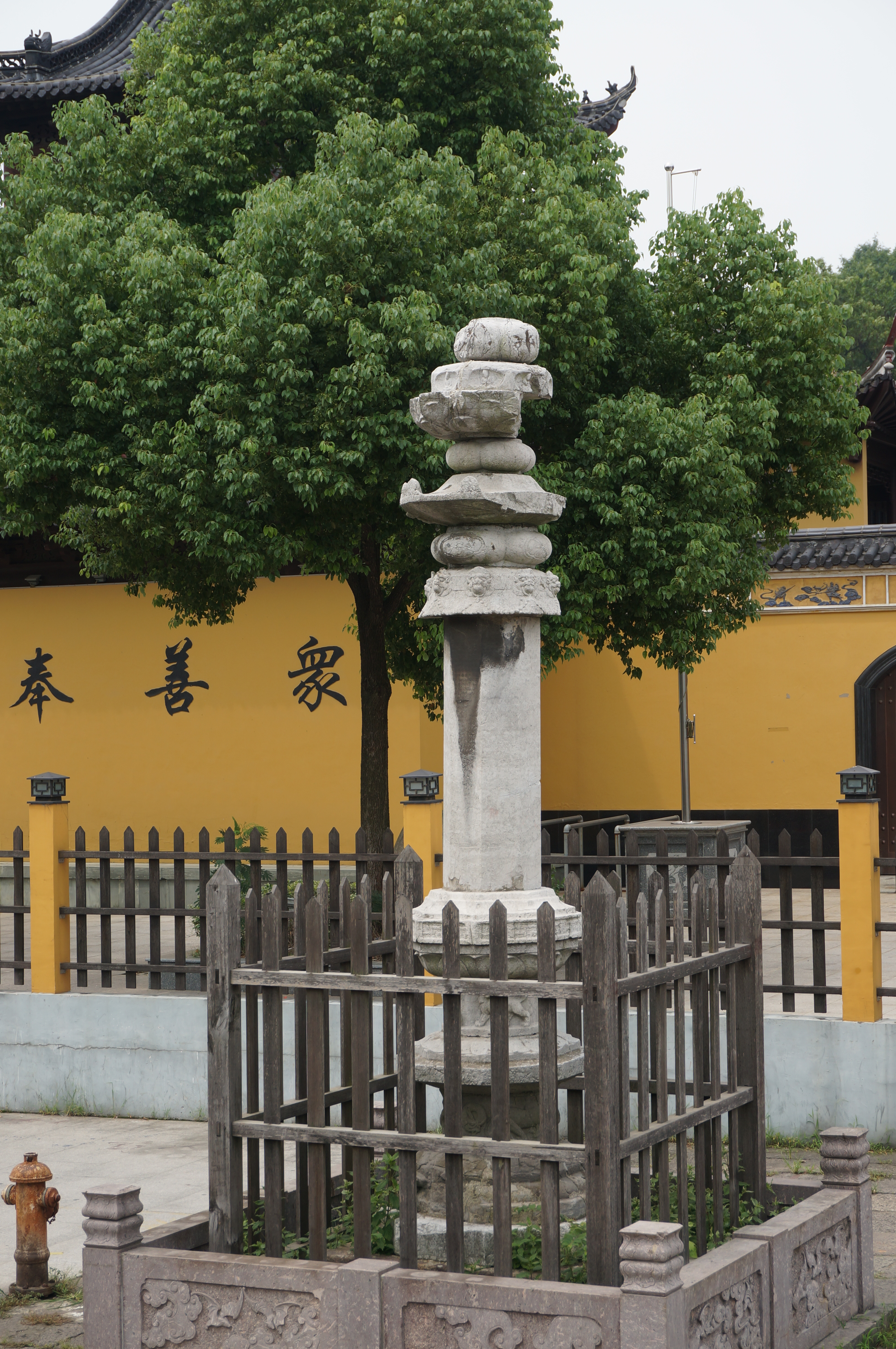 惠力寺，西侧经幢。